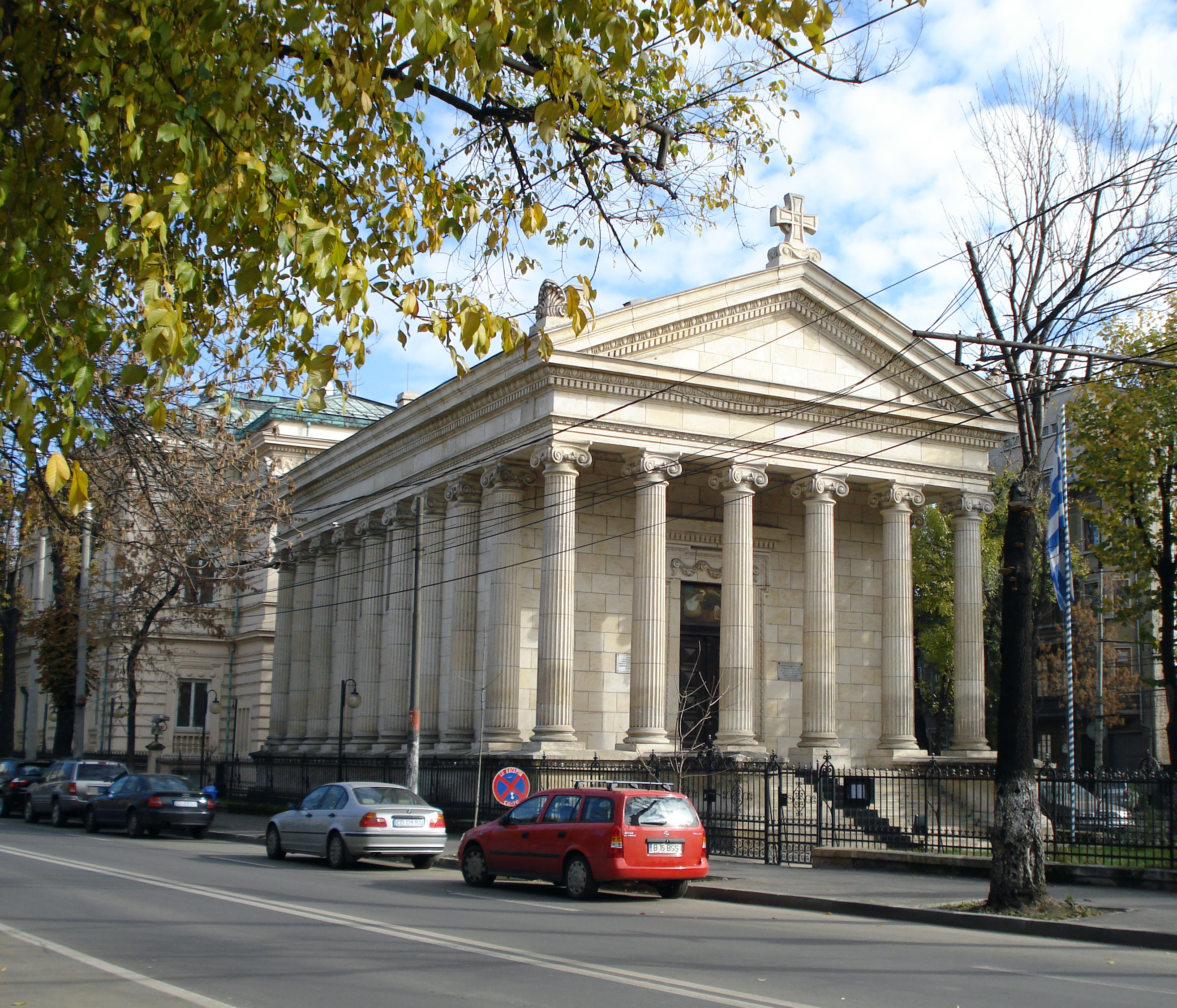 Biserica Greacă din București